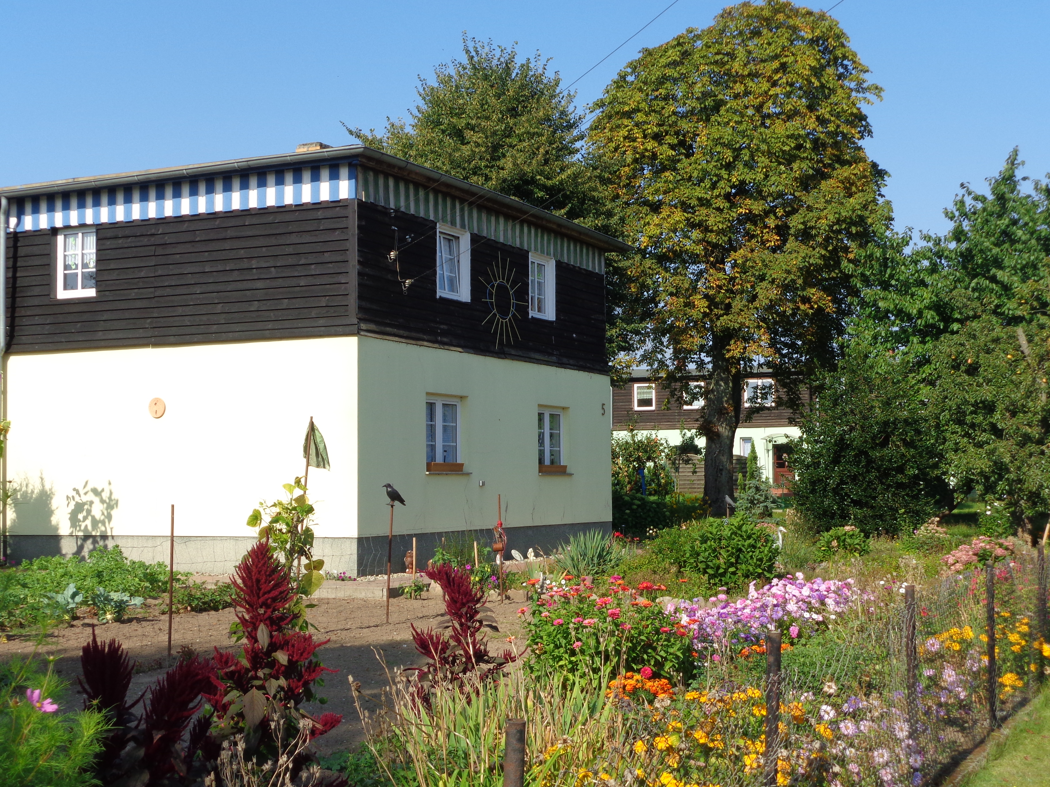 In den 1930er Jahren errichtete ostfriesische Häuser auf Bauernstellen in Fincken.